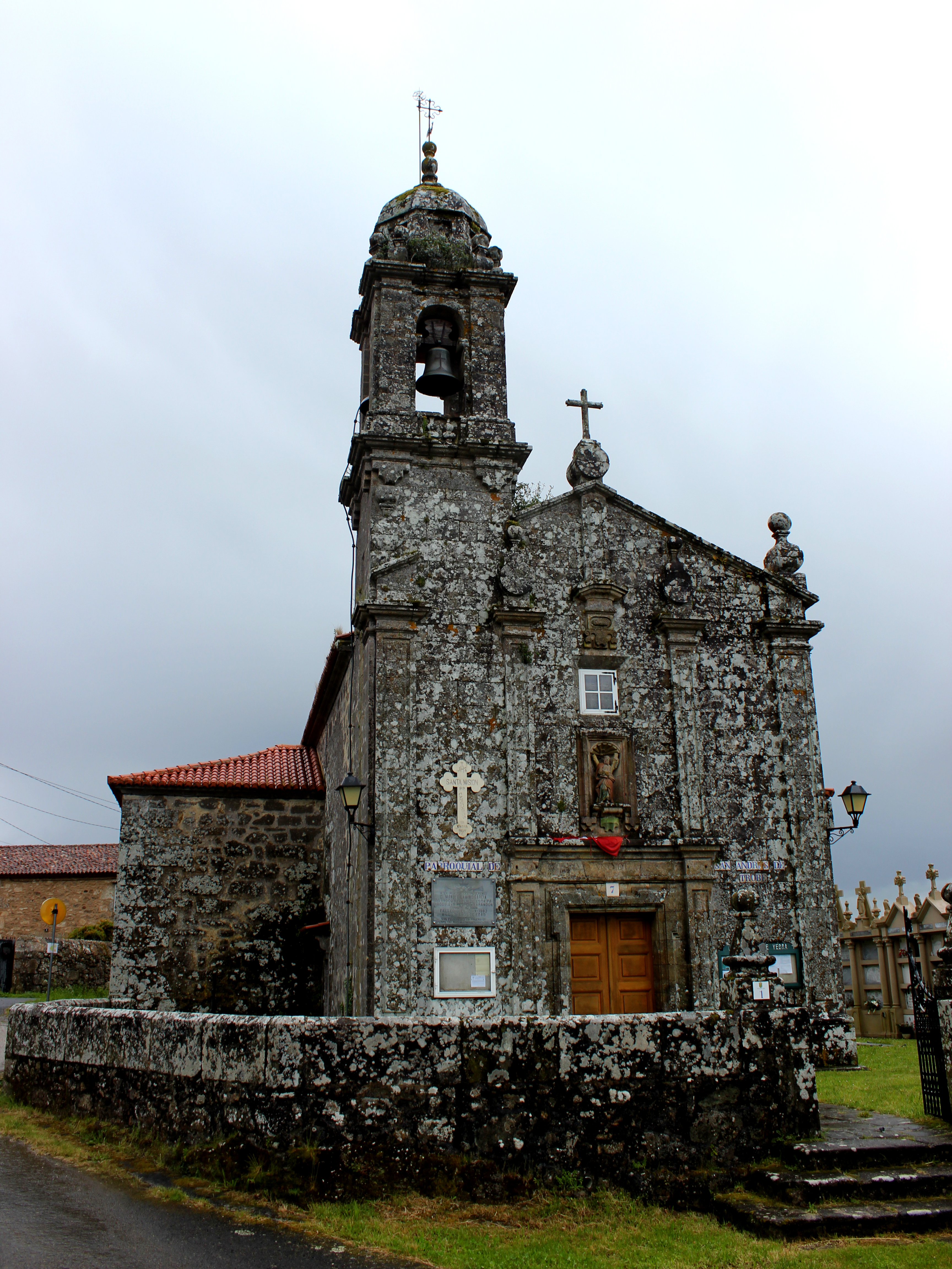 Igrexa de Trobe, Vedra